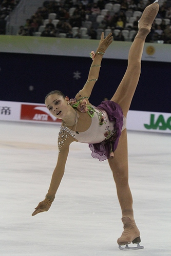 Аделина Сотникова на Кубке Китая 2011